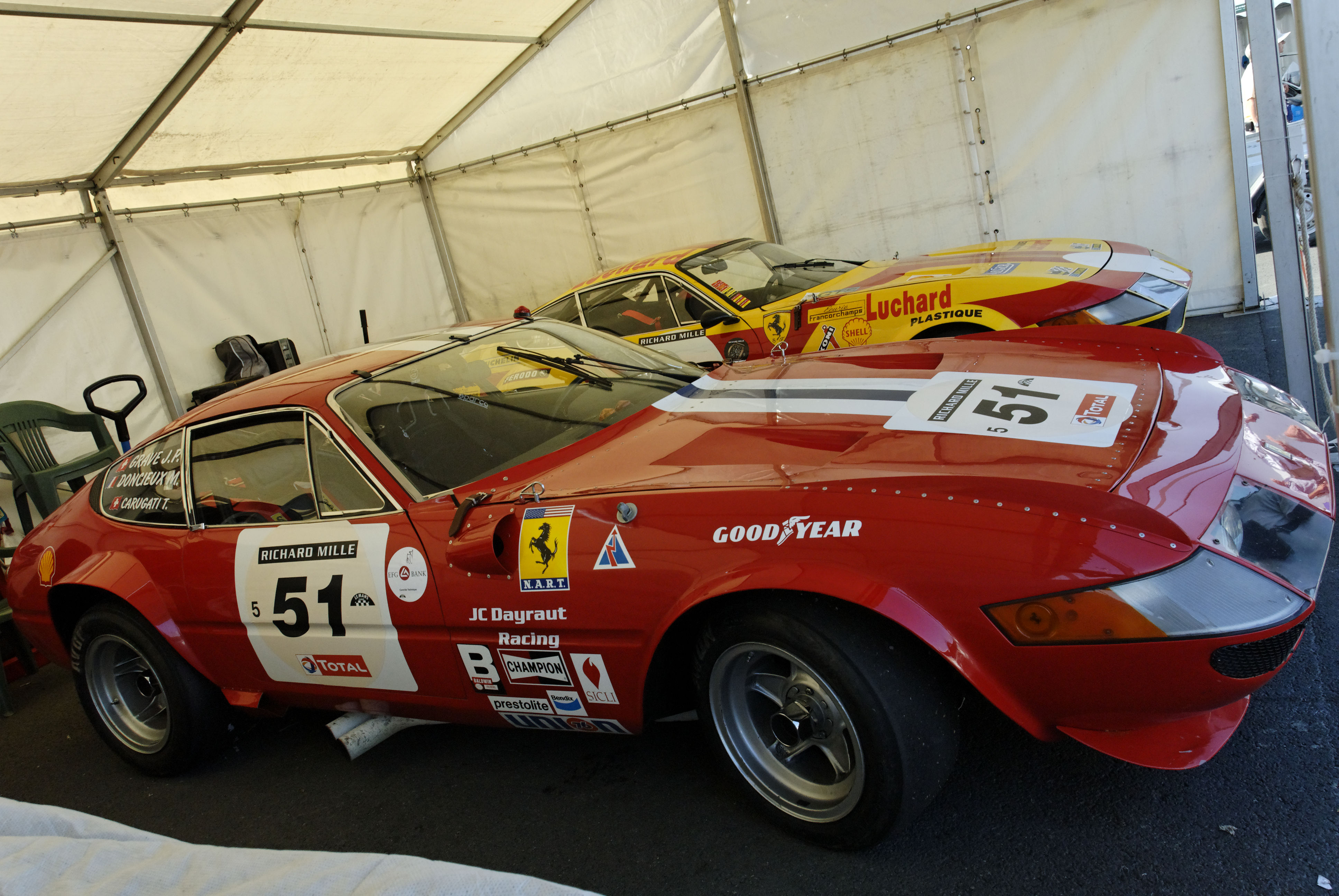 1971 Ferrari 365 GTB/4 Competizione s/n 14489 at Le Mans Classic 2010